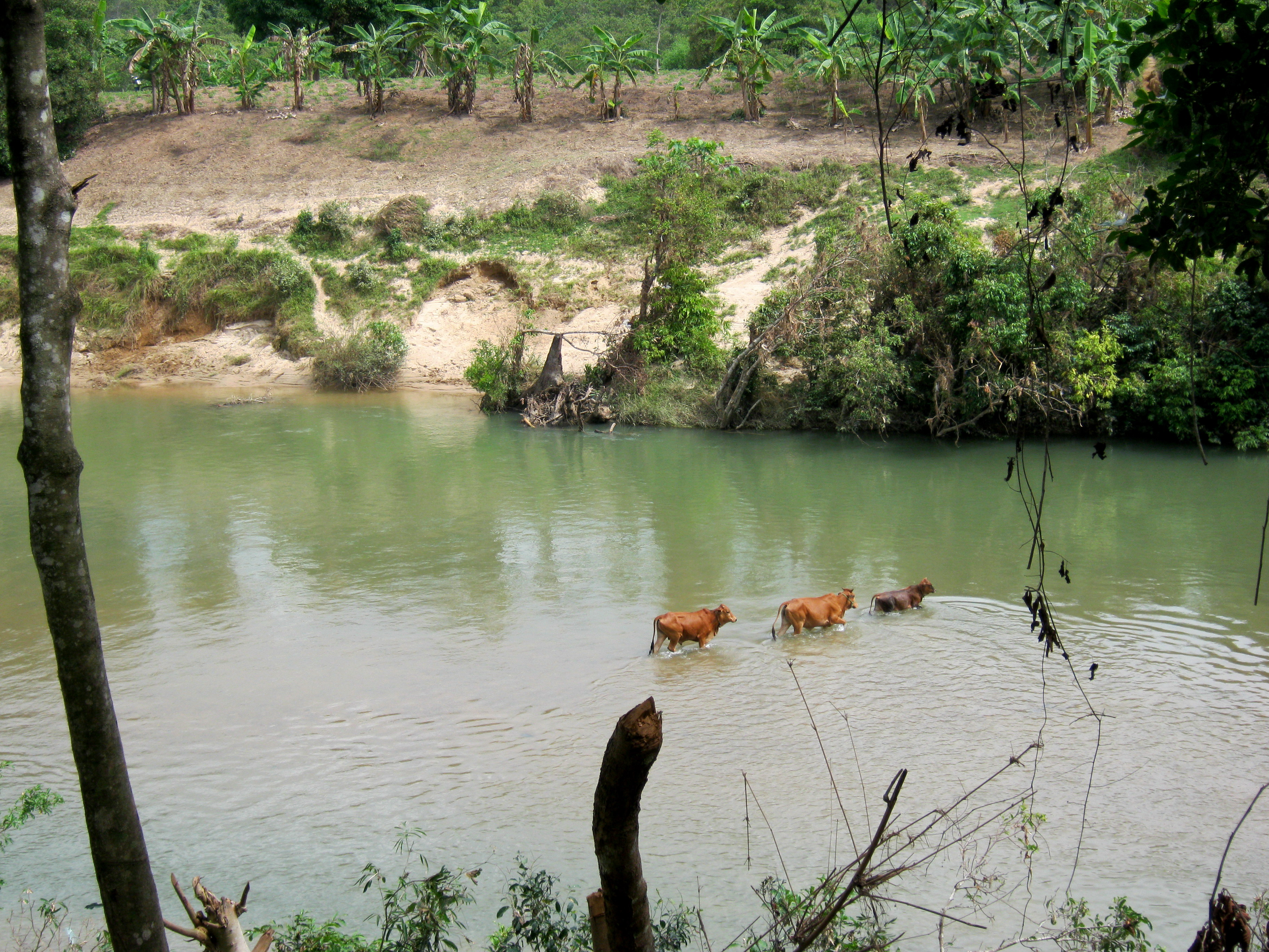 domestic cattle (Bos taurus) Cảnh bò lội qua dòng nước bắt gặp trên đường Đà Lạt - Nha Trang, Việt Nam.